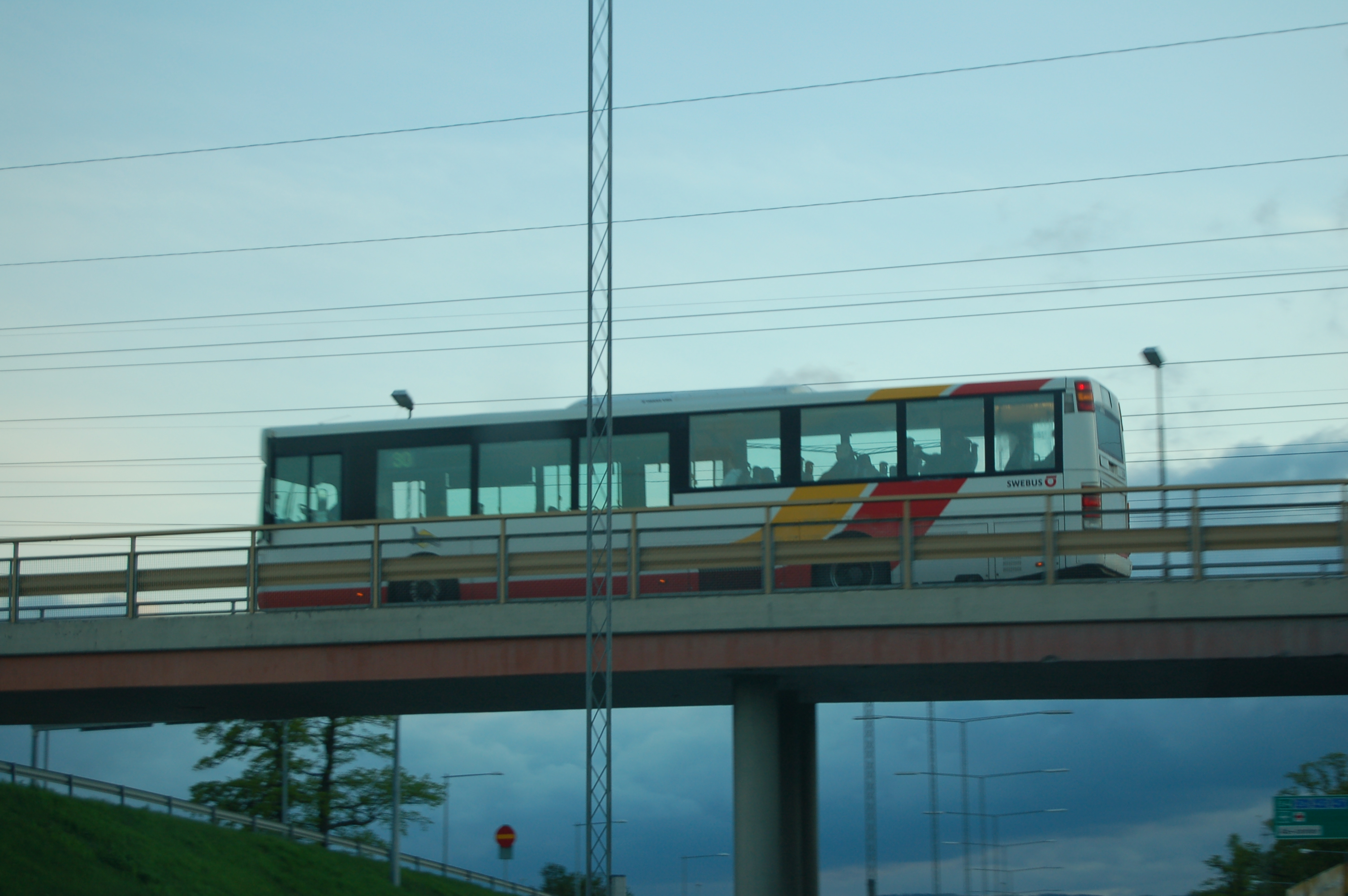 Bus number 30 on Ekhagsrondellen above E4 in Jönköping.